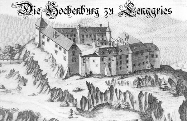 Kupferstich der Hohenburg in Lenggries